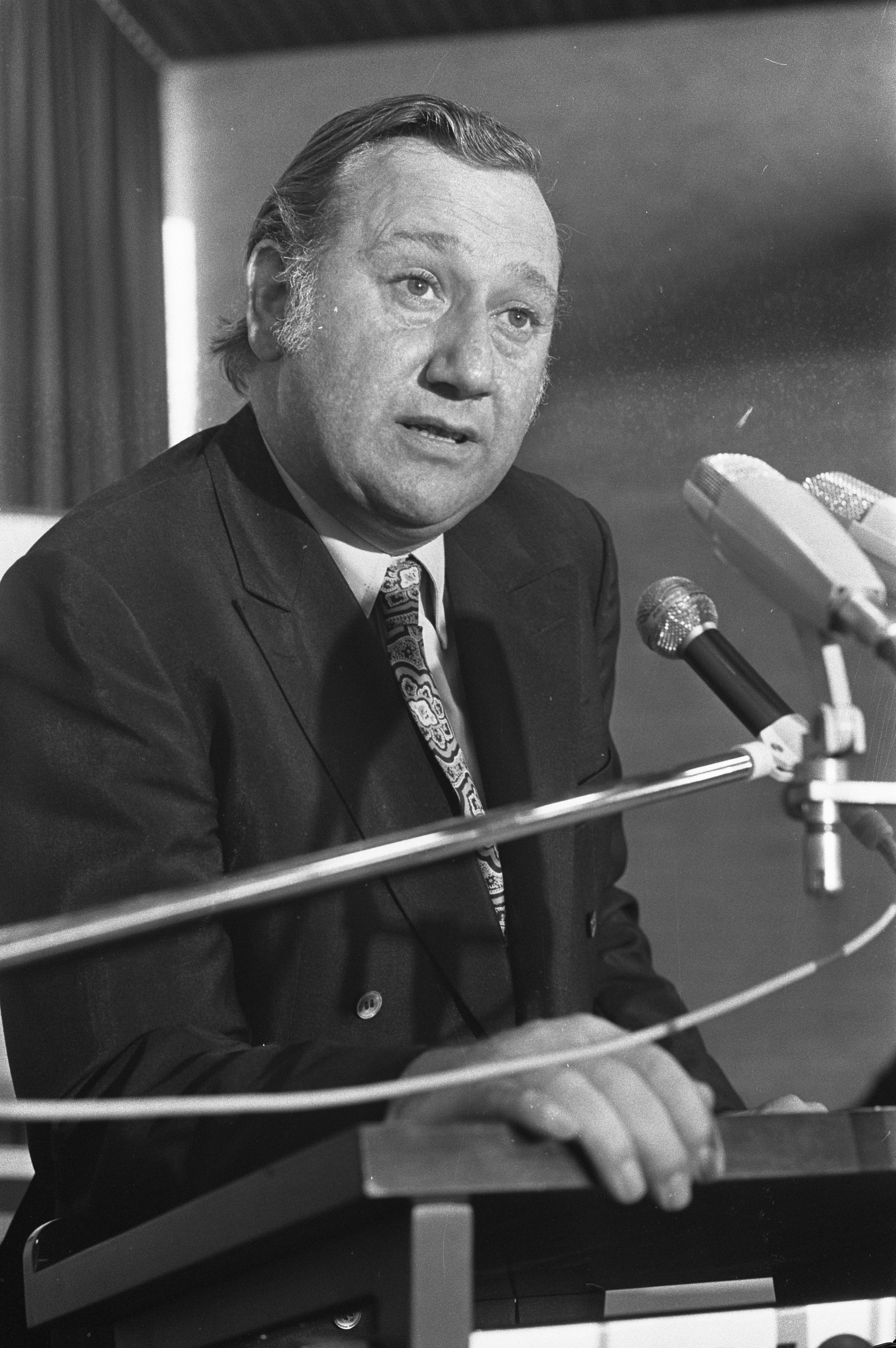 Collectie / Archief : Fotocollectie Anefo Reportage / Serie : [ onbekend ] Beschrijving : Partijcongres van D66 in de Flevohof in Flevoland; aftredend voorzitter Beekmans aan het woord Datum : 6 november 1971 Locatie : Biddinghuizen, Flevoland Trefwoorden : conferenties, politici, politiek, portretten Persoonsnaam : Beekmans, J.A.P.M. Instellingsnaam : D66 Fotograaf : Verhoeff, Bert / Anefo Auteursrechthebbende : Nationaal Archief Materiaalsoort : Negatief (zwart/wit) Nummer archiefinventaris : bekijk toegang 2.24.01.05 Bestanddeelnummer : 925-1109